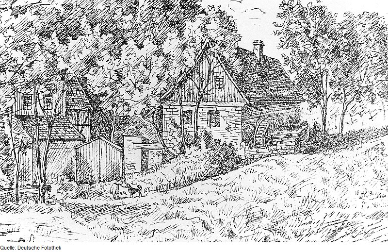 Original image description from the Deutsche Fotothek Dresden-Kaitz. Ehrlichsmühle im Kaitzbachtal 1890, aus: Meiche 1927